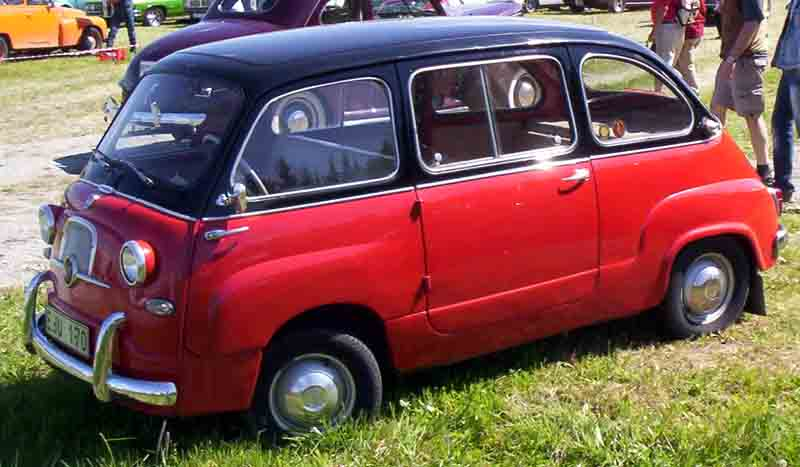 Fiat 600 Multipla 1960